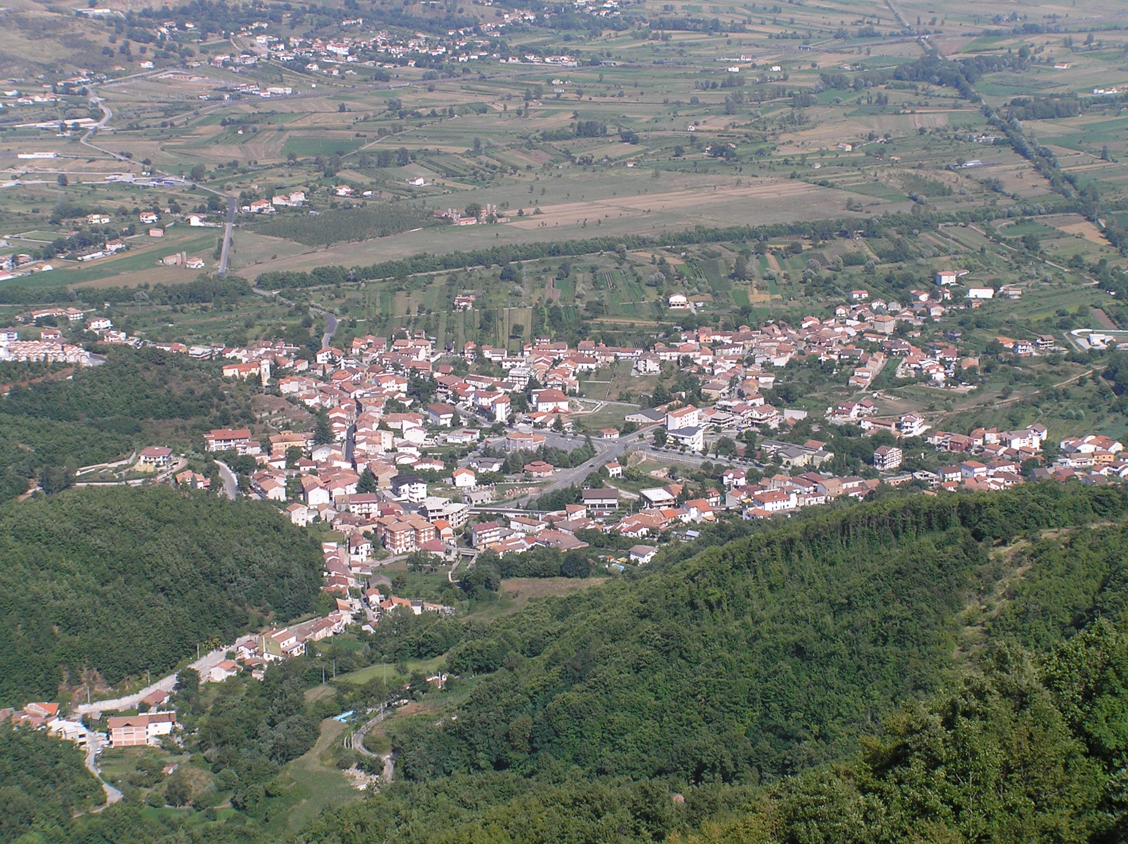 Veduta di Paterno dalla strada Provinciale Paterno-Padula